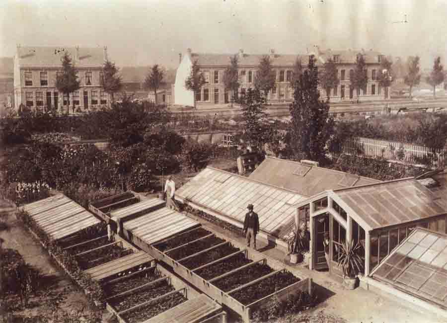 Gezicht op de kwekerij van Ballego (op de moestuin van de voormalige buitenplaats 'Groenhoven') tussen de Witte Singel en Rijn en schiekade/Trekvliet gezien vanuit Witte Singel 24. De kwekerij werd later bij de tuin van Witte Singel 24 getrokken. Op de achtergrond huisjes aan de Rijn en Schiekade. Circa 1930.